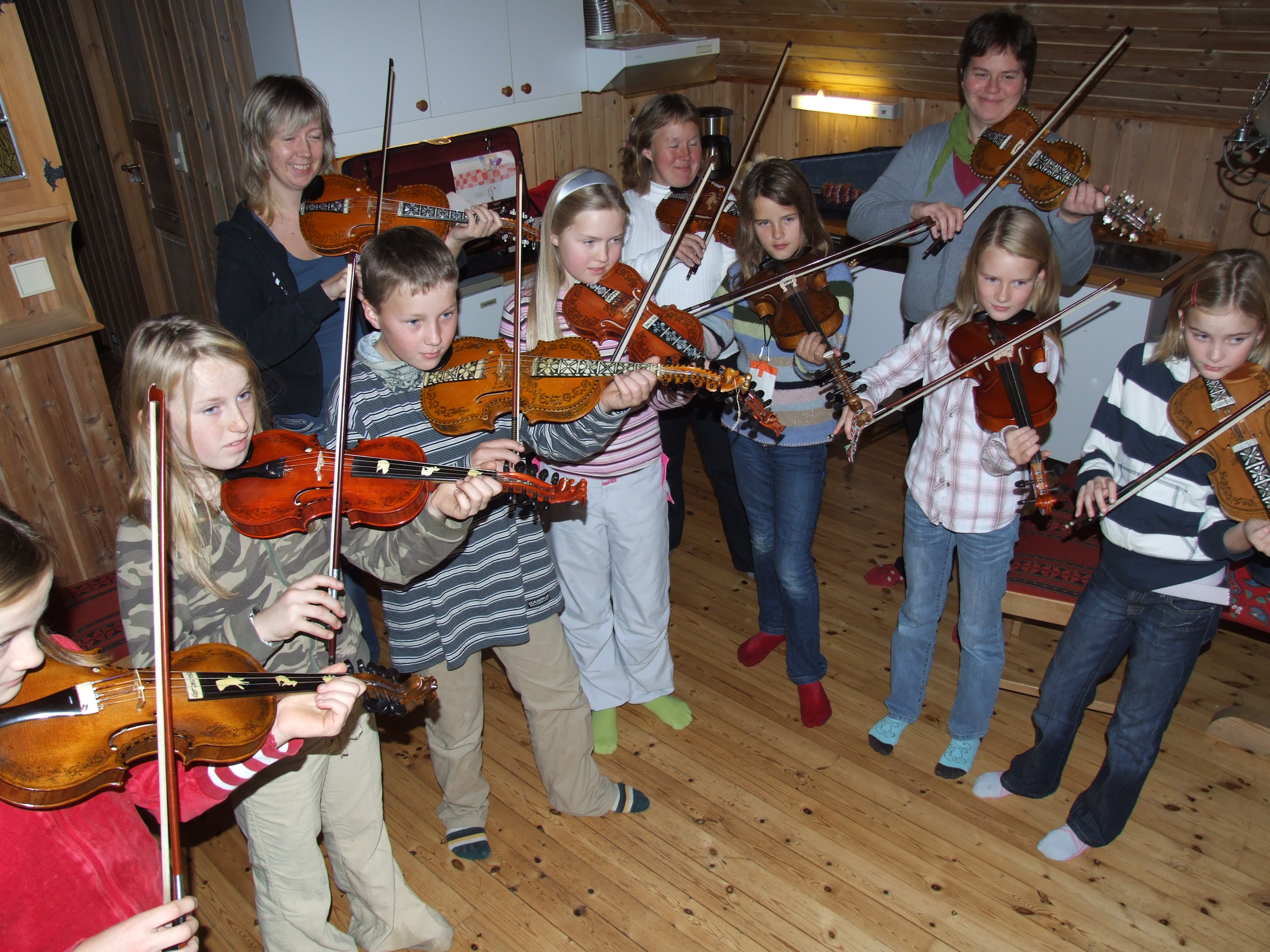 Norsk (nynorsk): Øving under Folkemusikkhelga